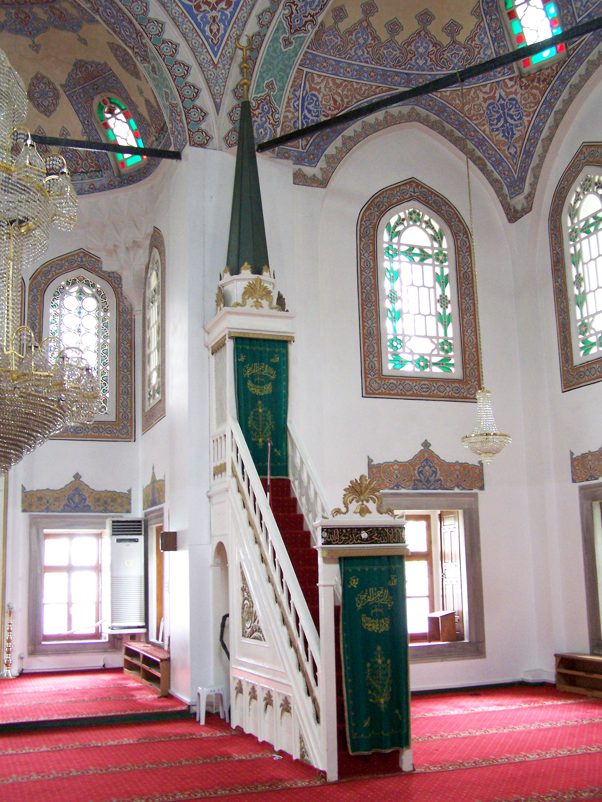 Minbar of Molla Çelebi Camii in Fındıklı